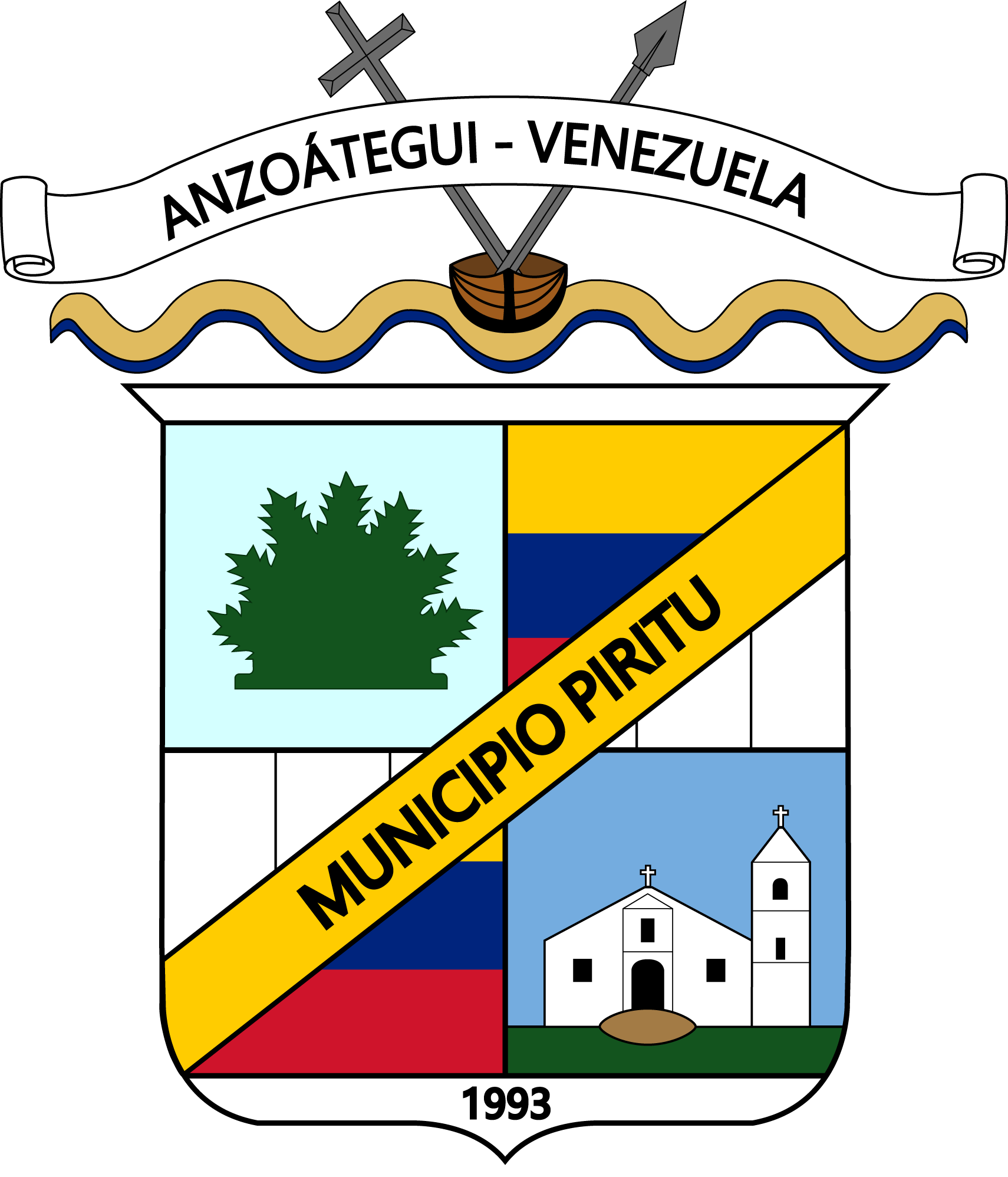 Escudo del municipio Pítitu. Estado Anzoátegui. Venezuela